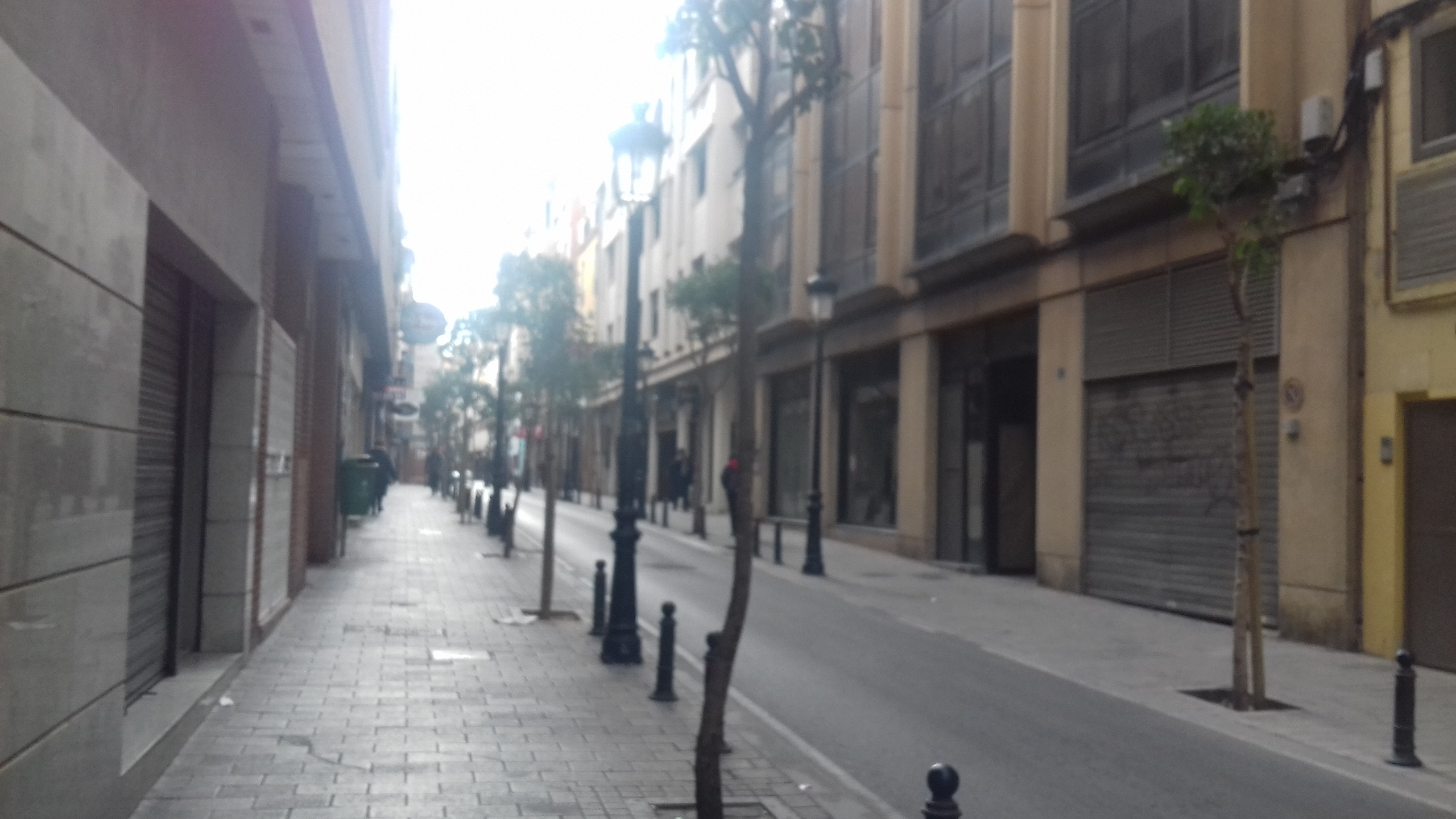 Calle Gaona